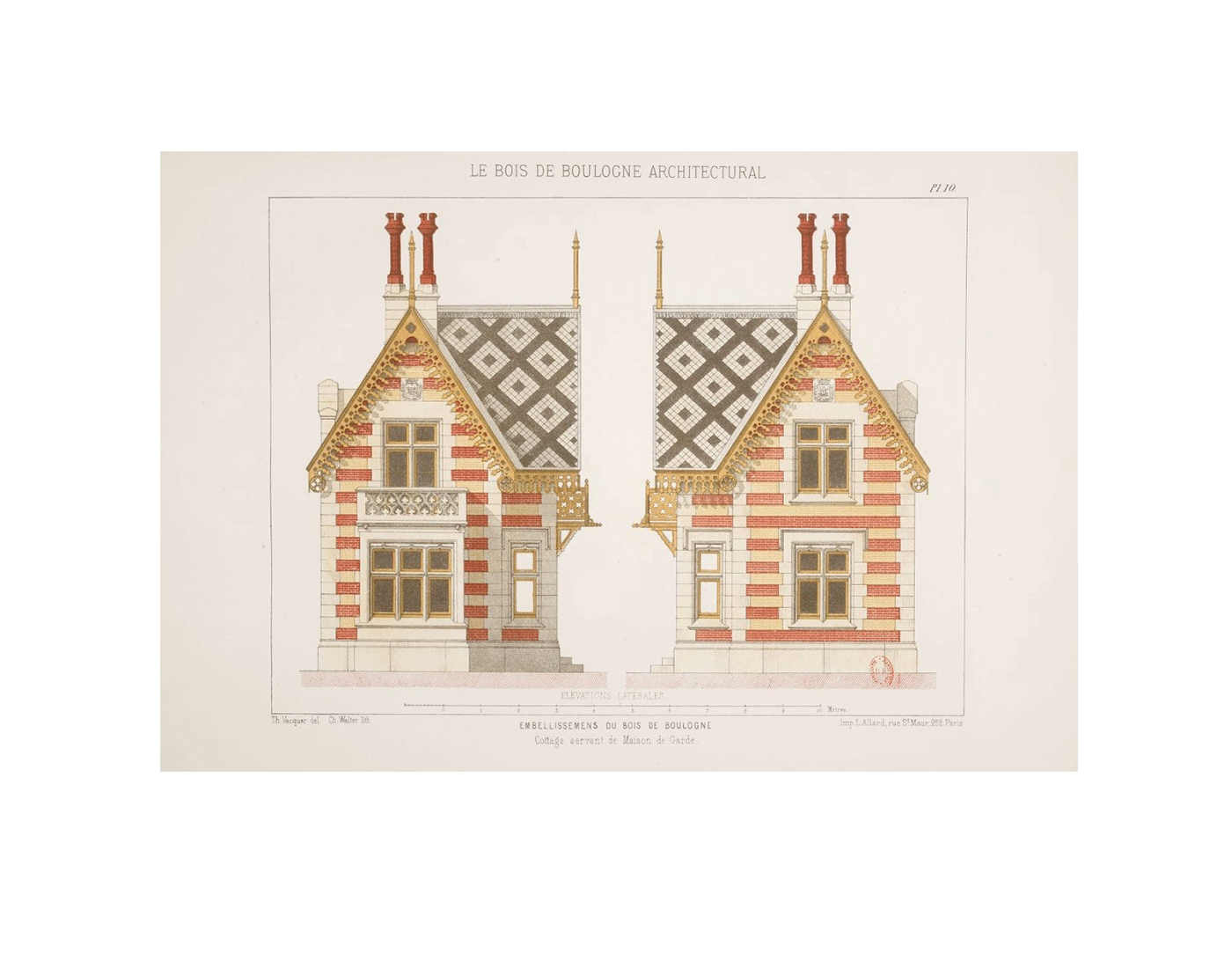 Le bois de Boulogne architectural, choix de constructions élevées dans son enceinte sous la direction de M. Alphand, ingénieur en chef des promenades et plantations de Paris, par M. Davioud, Inspecteur général des travaux de la Ville de Paris (1875).